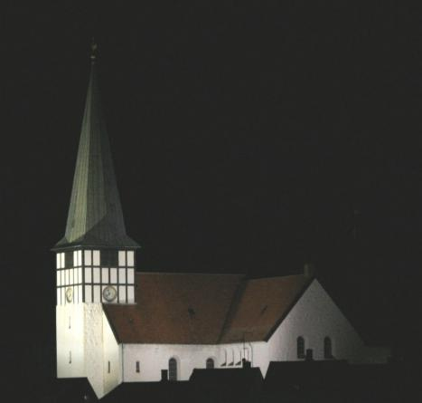 Sankt Nikolajkirke in Rønne (Bornholm, DK) by night